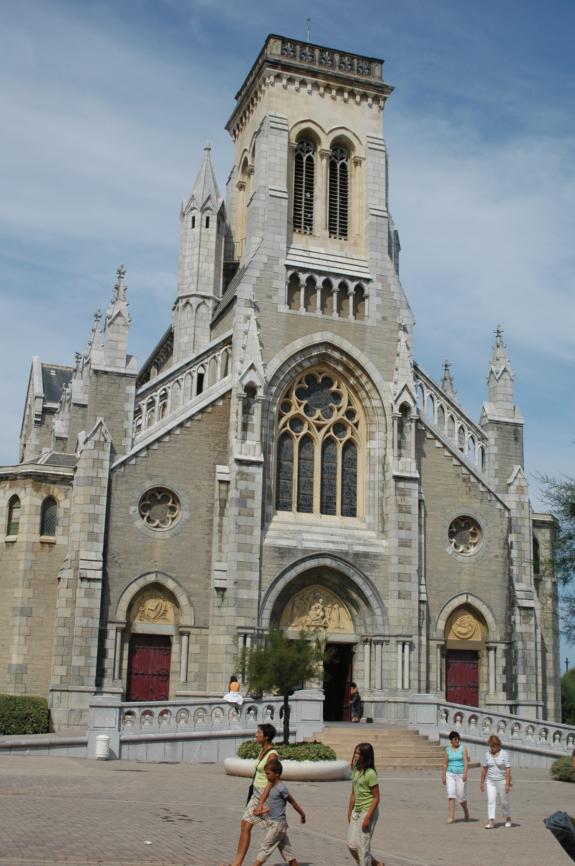 Biarritz, église Sainte Eugénie. Photo prise le 06/08/06